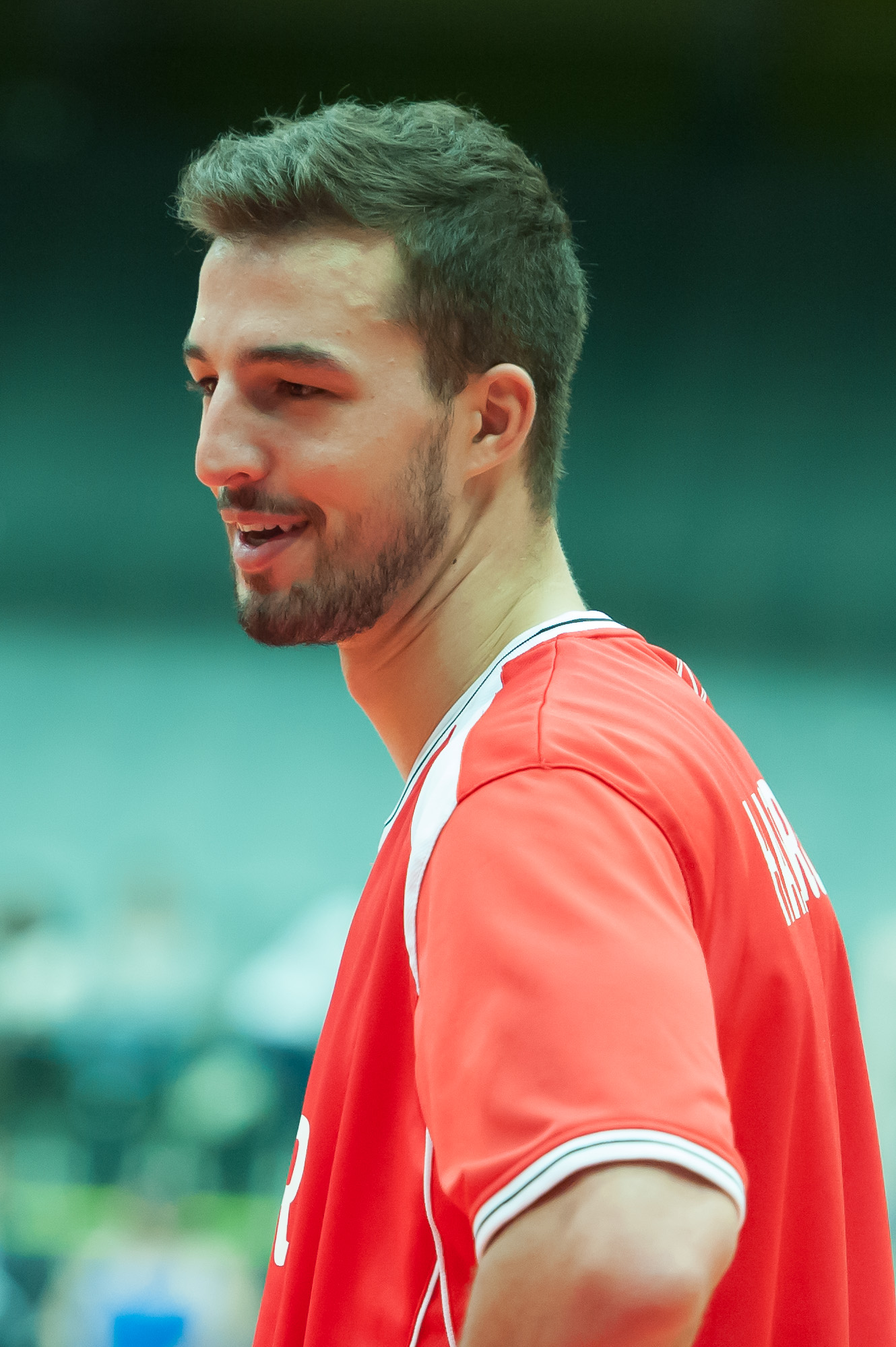 Basketball EM-Qualifikation Österreich gegen Polen Schwechat, 17. August 2014